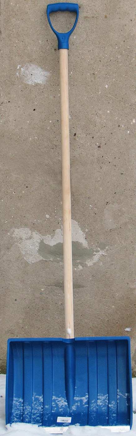 Beschreibung: Schneeschaufel / snow shovel Fotograf: Darkone, 31. Dezember 2005